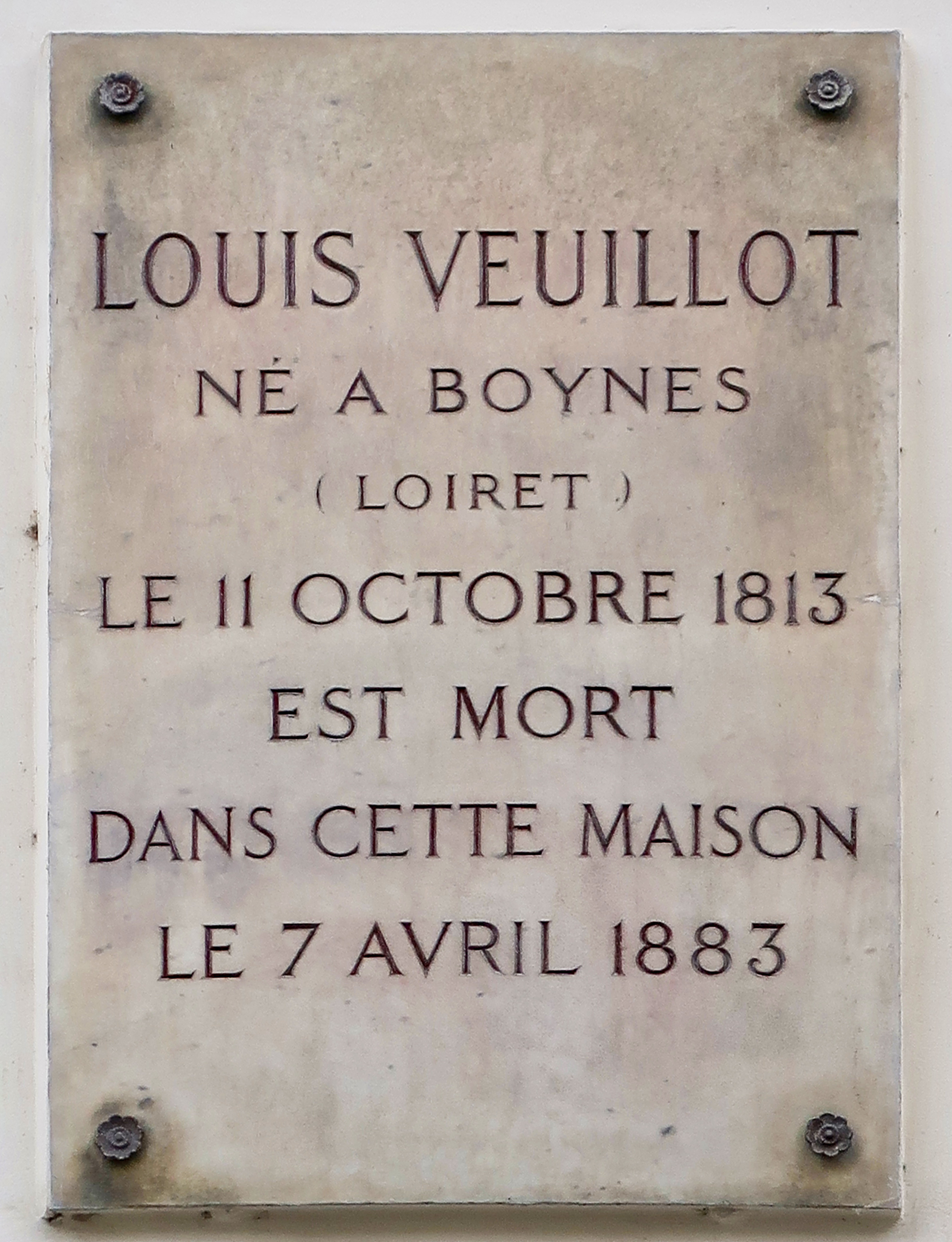 Plaque en hommage à Louis Veuillot, 21 rue de Varenne (Paris, 7e).